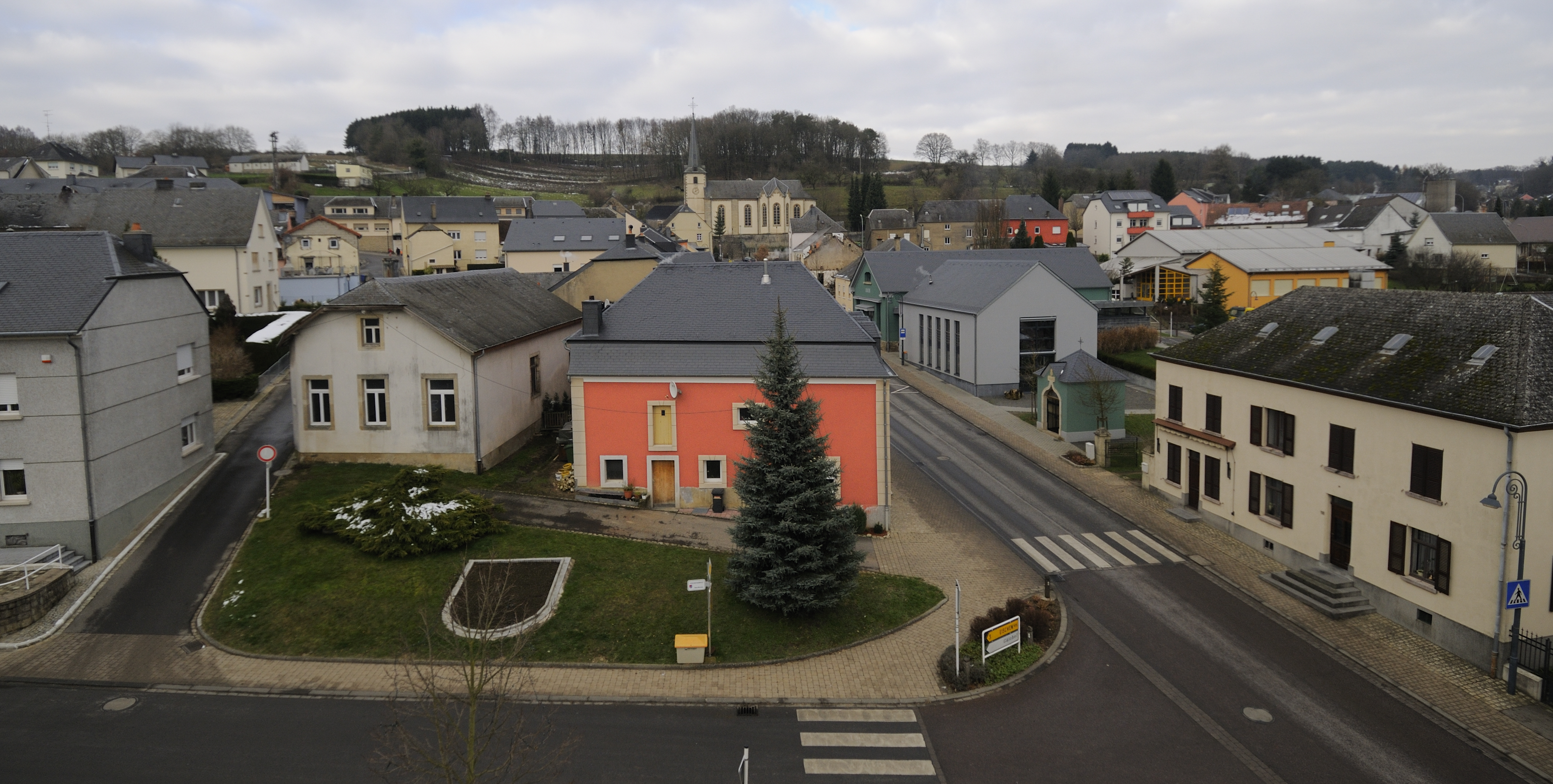 Habscht vun uewen